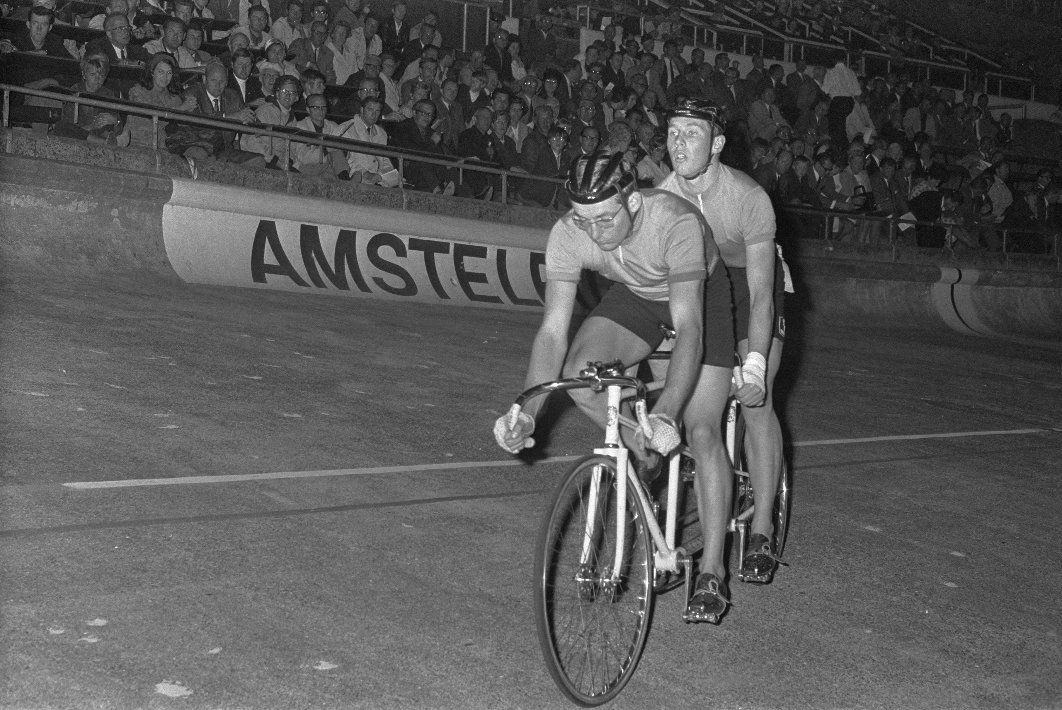 Collectie / Archief : Fotocollectie Anefo Reportage / Serie : Baanwielrennen in het Olympisch stadion Beschrijving : Het tandemkoppel Jansen/Loevesijn in actie Datum : 15 augustus 1968 Locatie : Amsterdam, Noord-Holland Trefwoorden : baanwielrennen Persoonsnaam : Jansen, Jan, Loevesijn, Leijn Fotograaf : Fotograaf Onbekend / Anefo Auteursrechthebbende : Nationaal Archief Materiaalsoort : Negatief (zwart/wit) Nummer archiefinventaris : bekijk toegang 2.24.01.05 Bestanddeelnummer : 921-5979